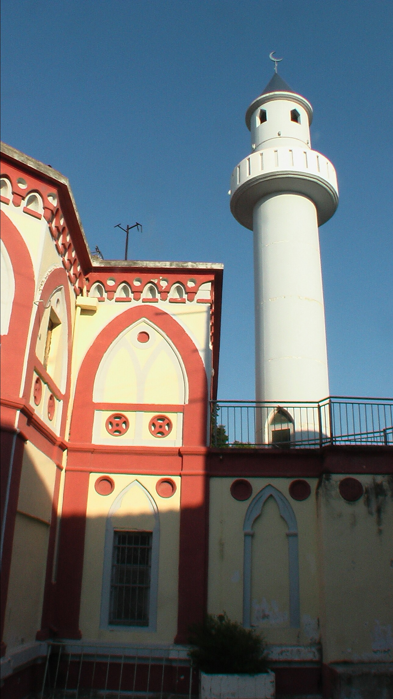 VlorëMoscheeNeshat Pashaj